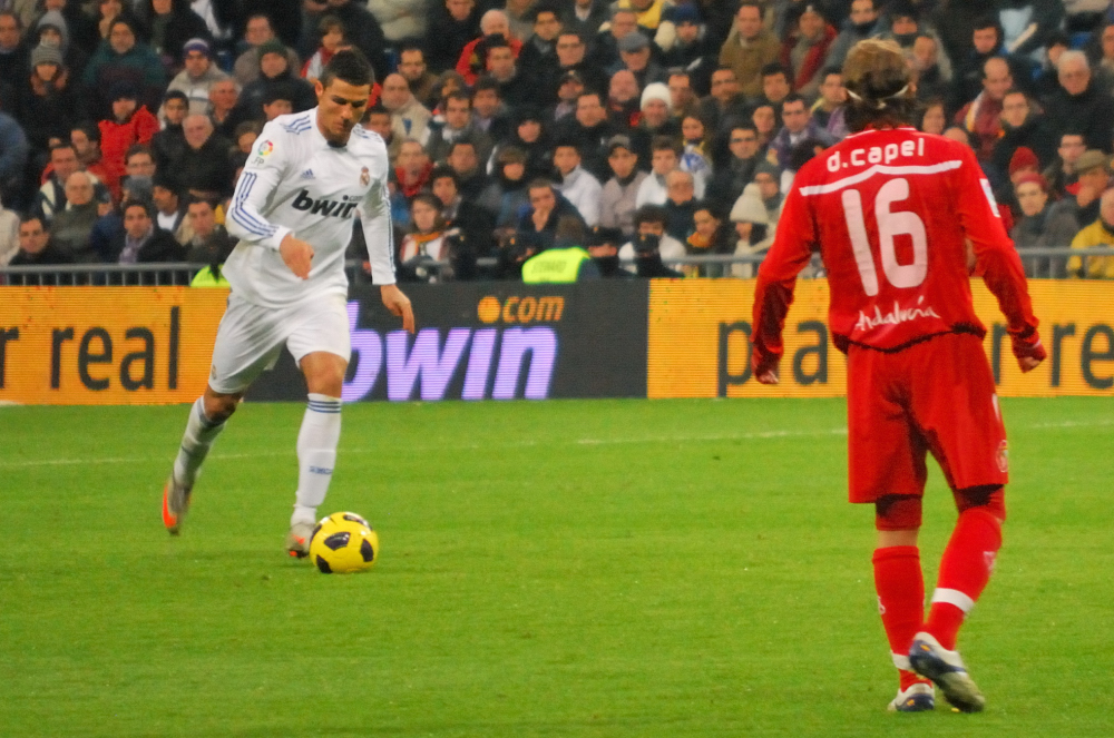 La liga 19-12-2010 Real Madrid 1 - Sevilla 0